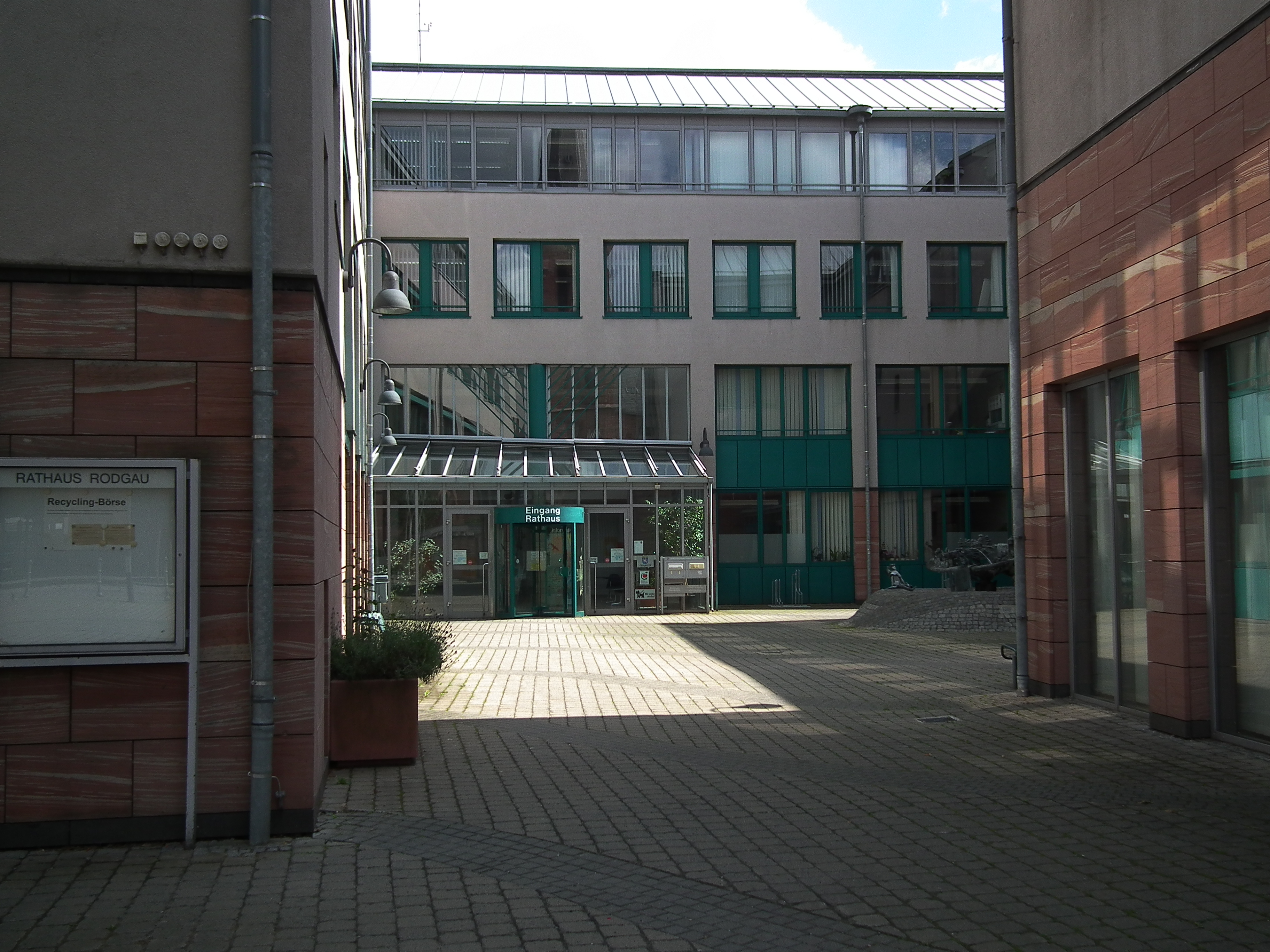 Innhof des Rodgauer Rathauses in Jügesheim (Hessen, Deutschland)